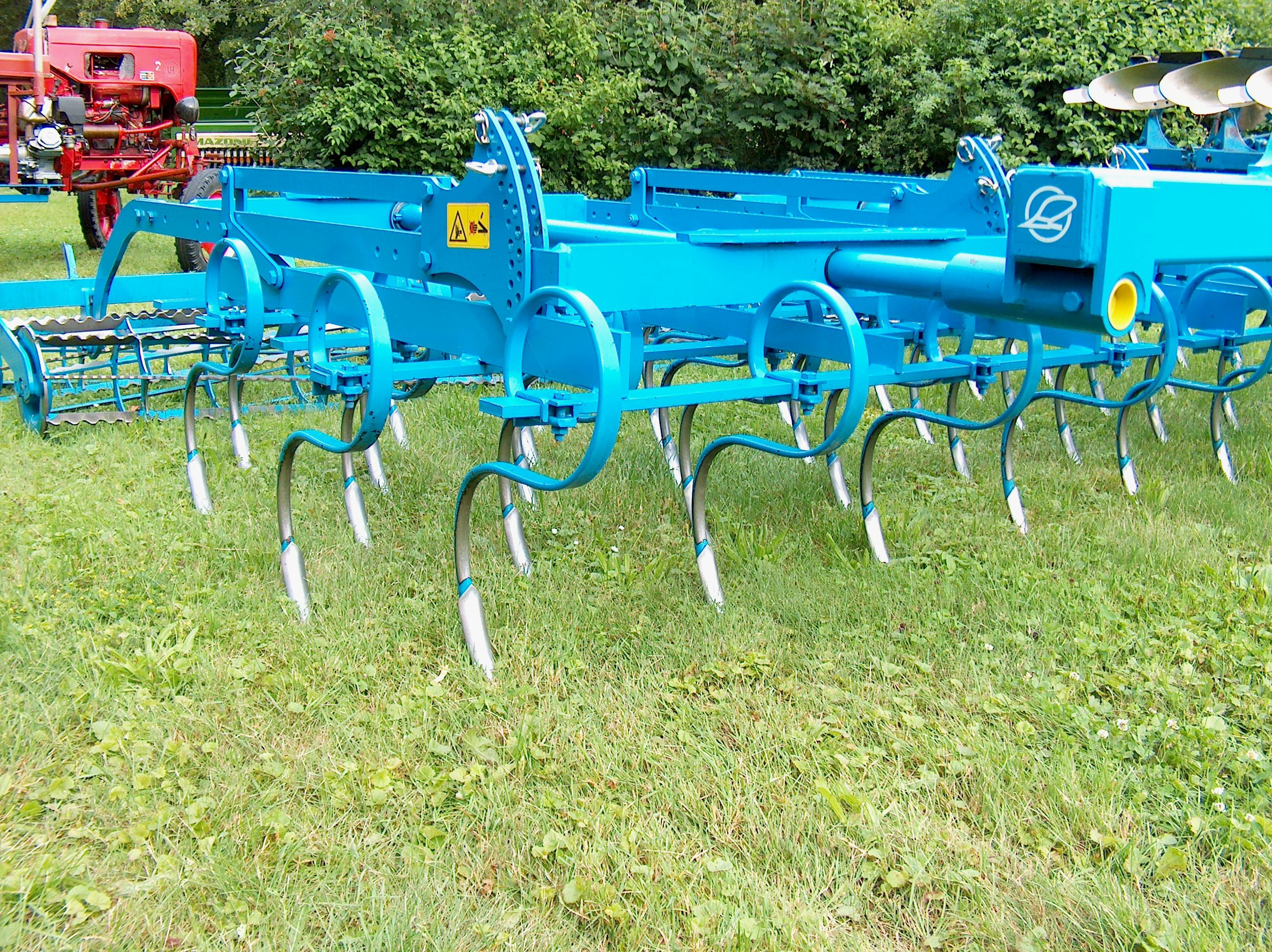 Federzinkenegge, System Korund der Firma Lemken